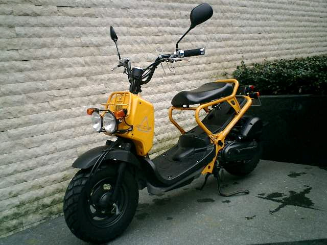 Japanese Honda Zoomer